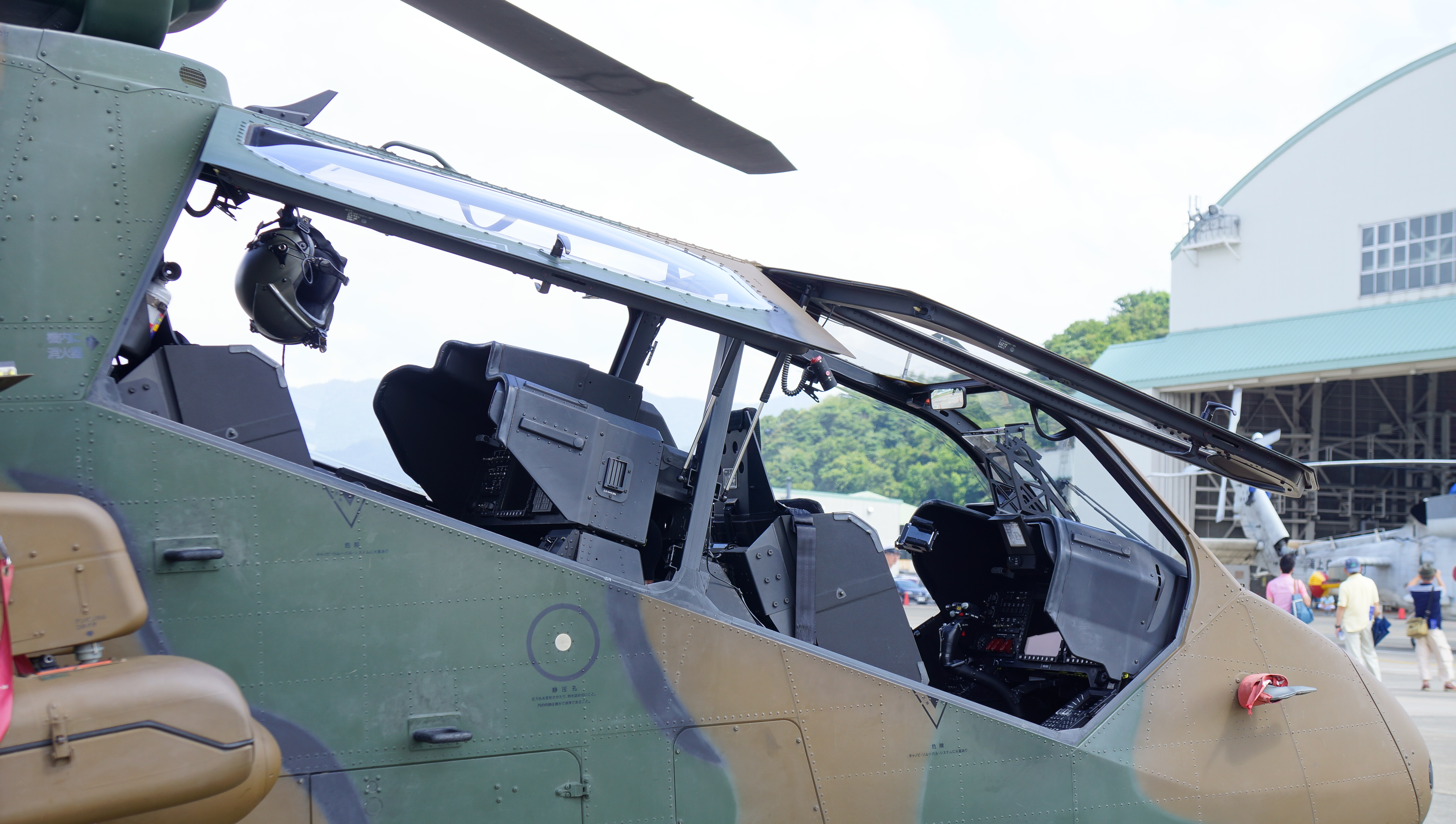 陸上自衛隊 OH-1観測ヘリコプター（32634号機） コックピット 右後部。2014年7月27日 海上自衛隊舞鶴航空基地にて。